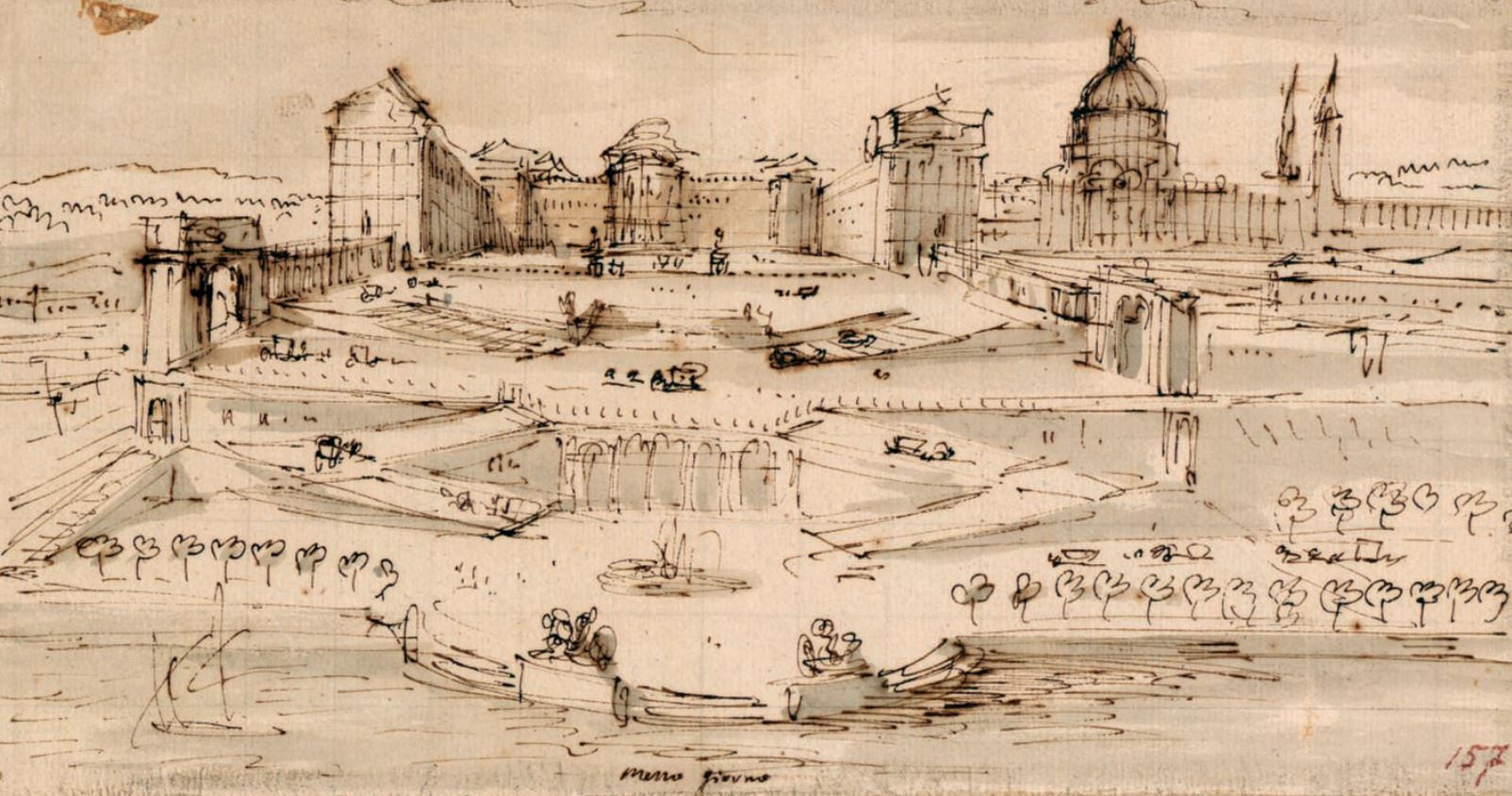 Projeto de Juvarra para o Palacio Real de Lisboa